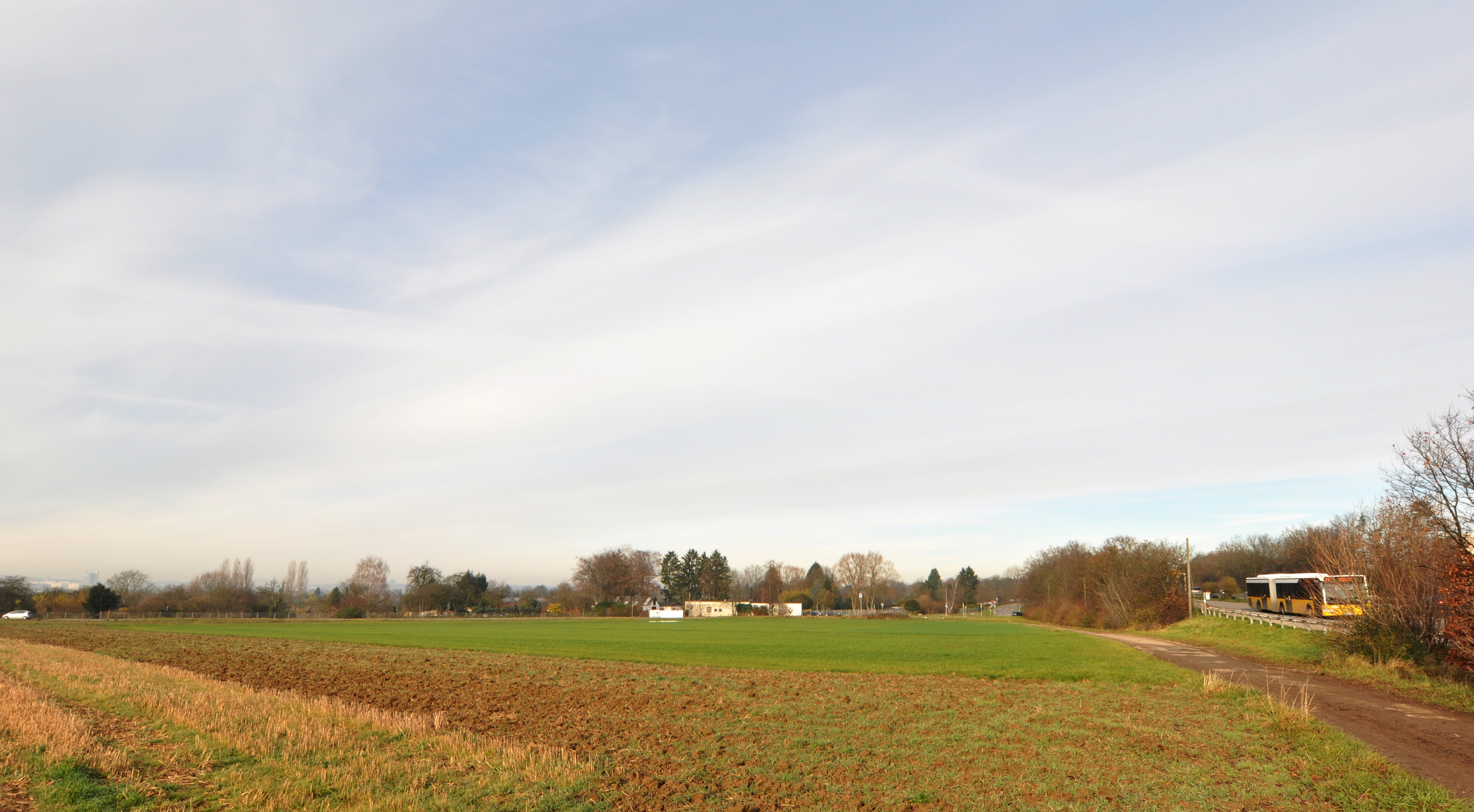 Fildertunnel, Blick von geplanten Zwischenangriff Sigmaringer Straße Richtung Norden